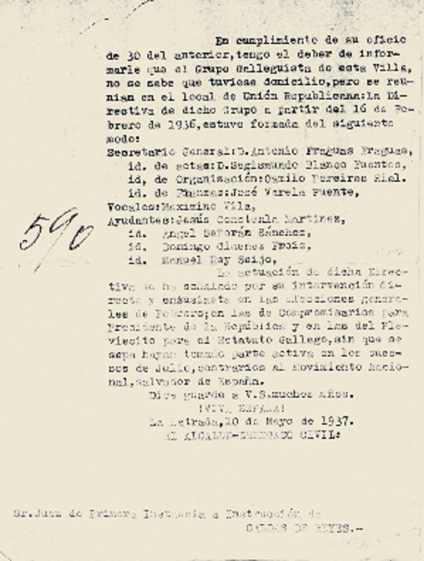 En cumplimiento de su oficio de 30 del anterior, tengo el deber de infor- marle que el Grupo Galleguista de esta Villa, no se sabe que tuviese domicilio,pero se reu- nian en el local de Unión Republicana; la Di- rectiva de dicho Grupo a partir del 16 de Fe- brero de 1936, estuvo formada del siguiente modo: Secretario General:D. Antonio Fraguas Fraguas. id. de actas:D. Seguismundo Blanco Fuentes, id. de Organización:Camilo Pereiras Rial, id. de Finazas:José Varela Puente, Vocales:Maximino Vila Ayudantes:Jesús XXX Martínez id. Ángel Señorán Sánchez id. Domingo Giménez Frois id. Manuel Rey Seijo La actuación de dicha Direc- tiva se ha XXX por su intervención di- recta y entusiasta en las elecciones genera- les de febrero;en las de Compromisarios para Presidente de la República y en las del Ple- viscito para el Estatuto Gallego,sin que se sepa hayan tenido parte activa en los suce- sos de Julio,contrarios al Movimiento Nacio- nal, salvador de España. Dios guarde a V.S.muchos años. !VIVA ESPAÑA! La Estrada,10 de Mayo de 1937. EL ALCALDE-DELEGADO CIVIL Sr. Juez de Primera Instancia e Instrucción de CALDAS DE REYES.